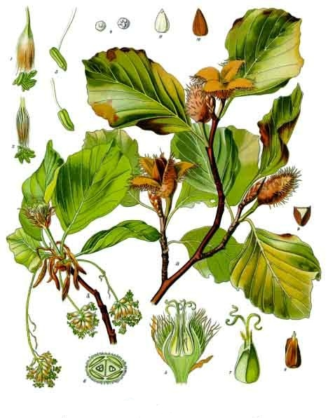 Rotbuche. A blühender und B fruchtender Zweig, natürl. Grösse; 1 männliche Blüthe mit Kelch, vergrössert; 2 dieselbe ohne Kelch, desgl.; 3 Staubgefässe, desgl.; 4 Pollen, desgl.; 5 weibliche Blüthe im Längsschnitt, desgl.; 6 dieselbe im Querschnitt, desgl.; 7 Fruchtknoten, desgl.; 8 Frucht, natürl. Grösse; 9 dieselbe im Querschnitt, desgl.; 10 Same mit Hülle, desgl.; 11 derselbe ohne Hülle, desgl.